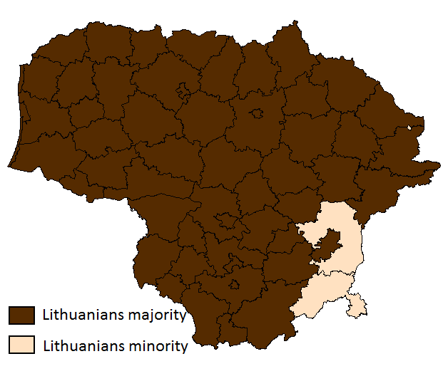 Tamsi spalva - lietuvių dauguma, šviesi spalva - lietuvių mažuma